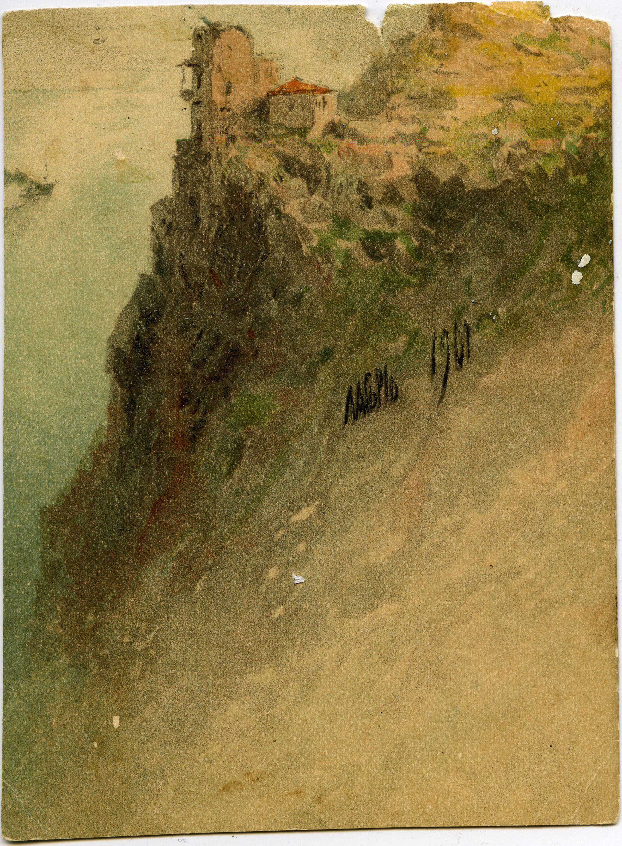 Ласточкино гнездо в Крыму возле Ай-Тодора. 1901